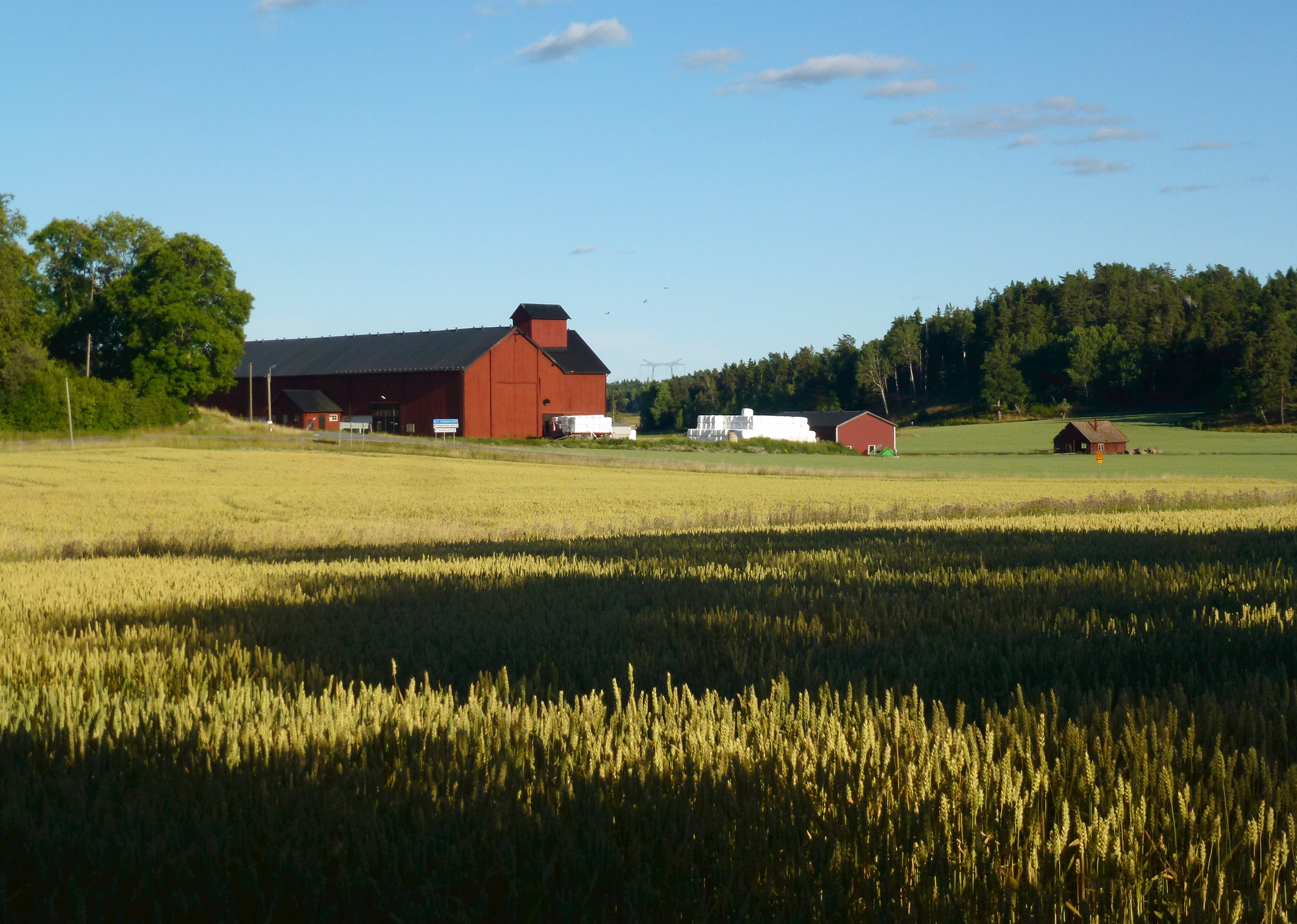 Kulturlandskapet vid Ladviks gård